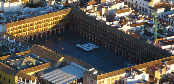 Vista aérea de la Plaza de la Corredera, Córdoba (España).